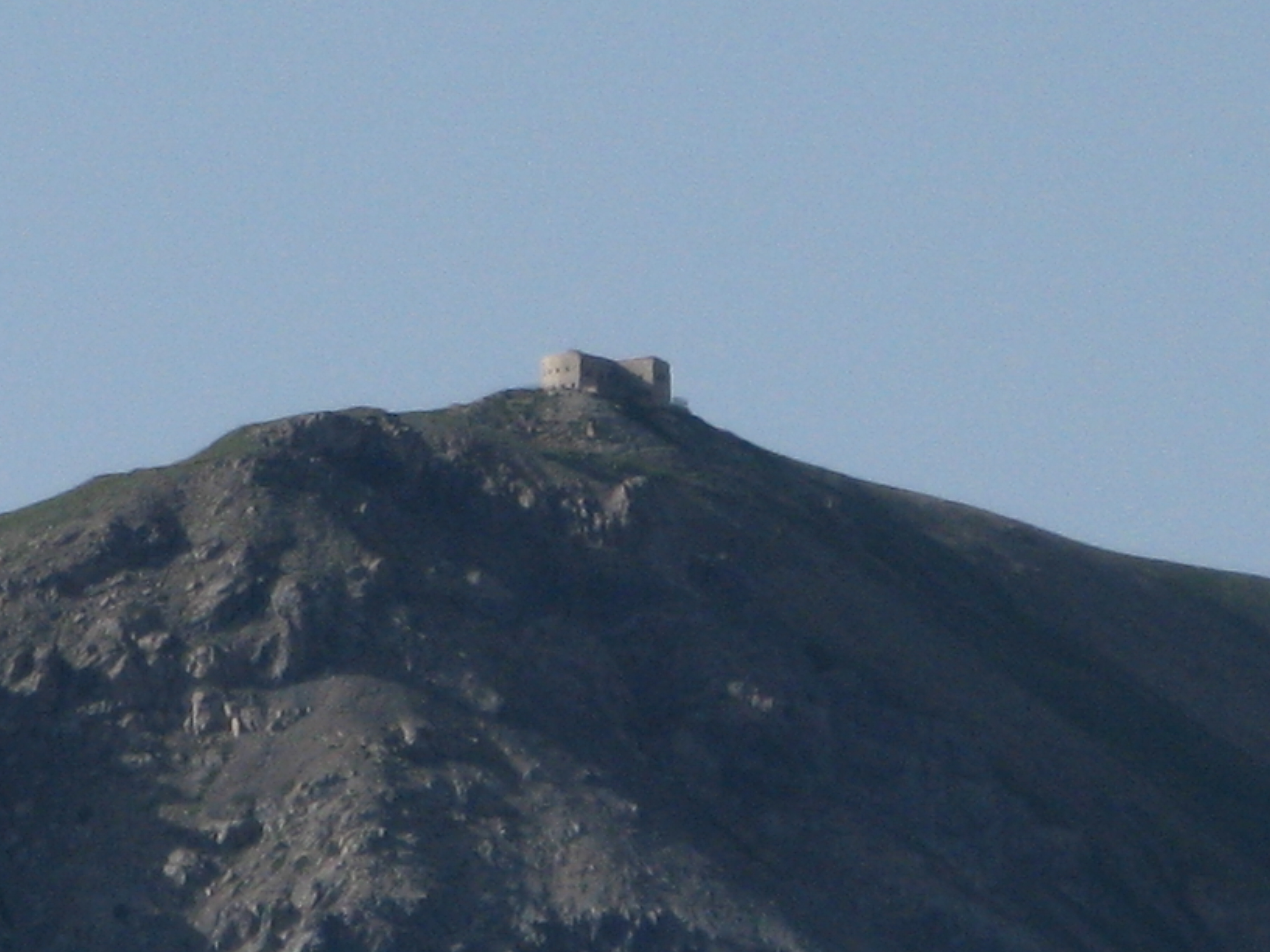 Fort Lenlon, vu des pentes de l'Aiguille Rouge